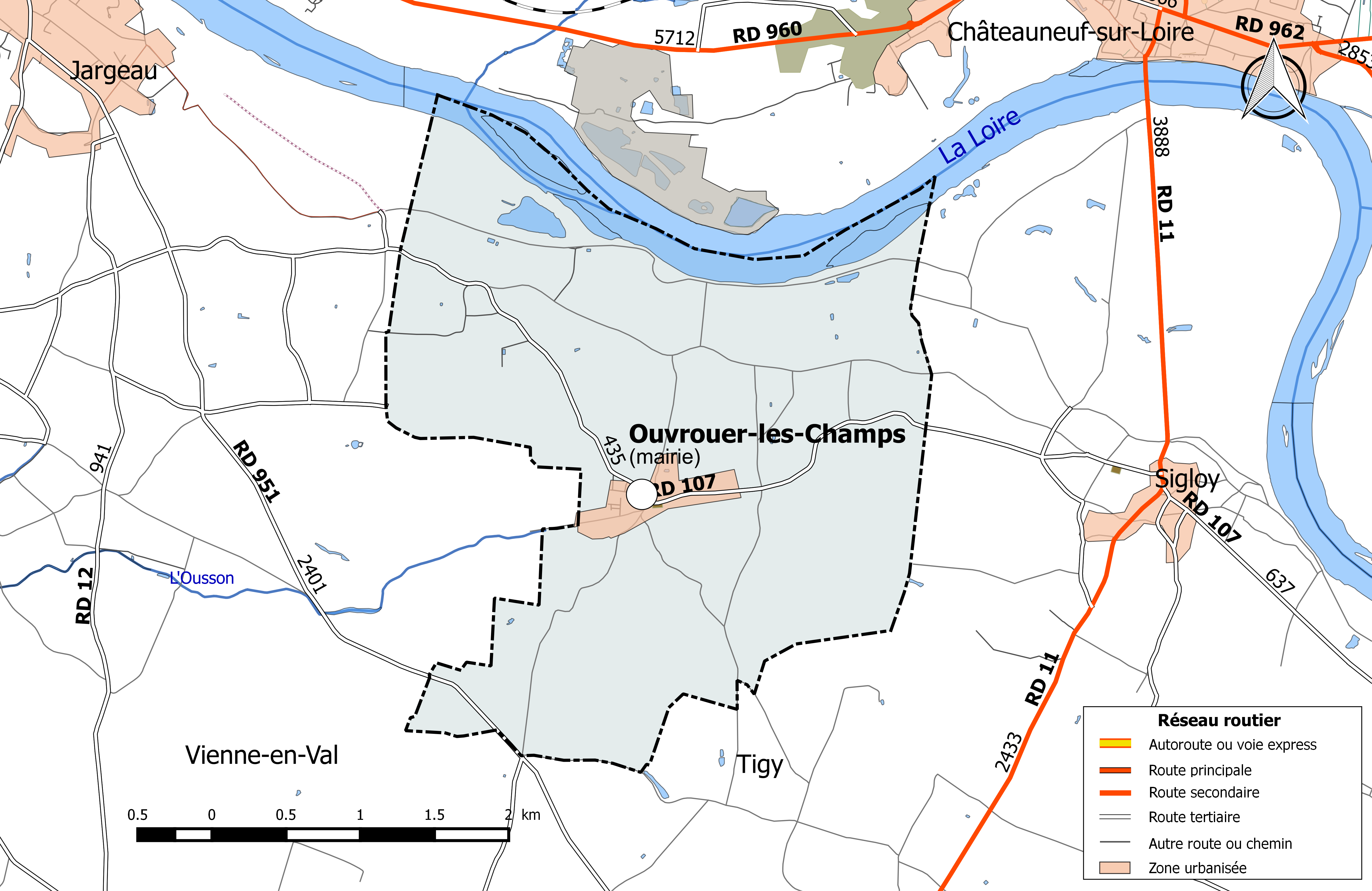 Carte du réseau routier de la commune de Ouvrouer-les-Champs.